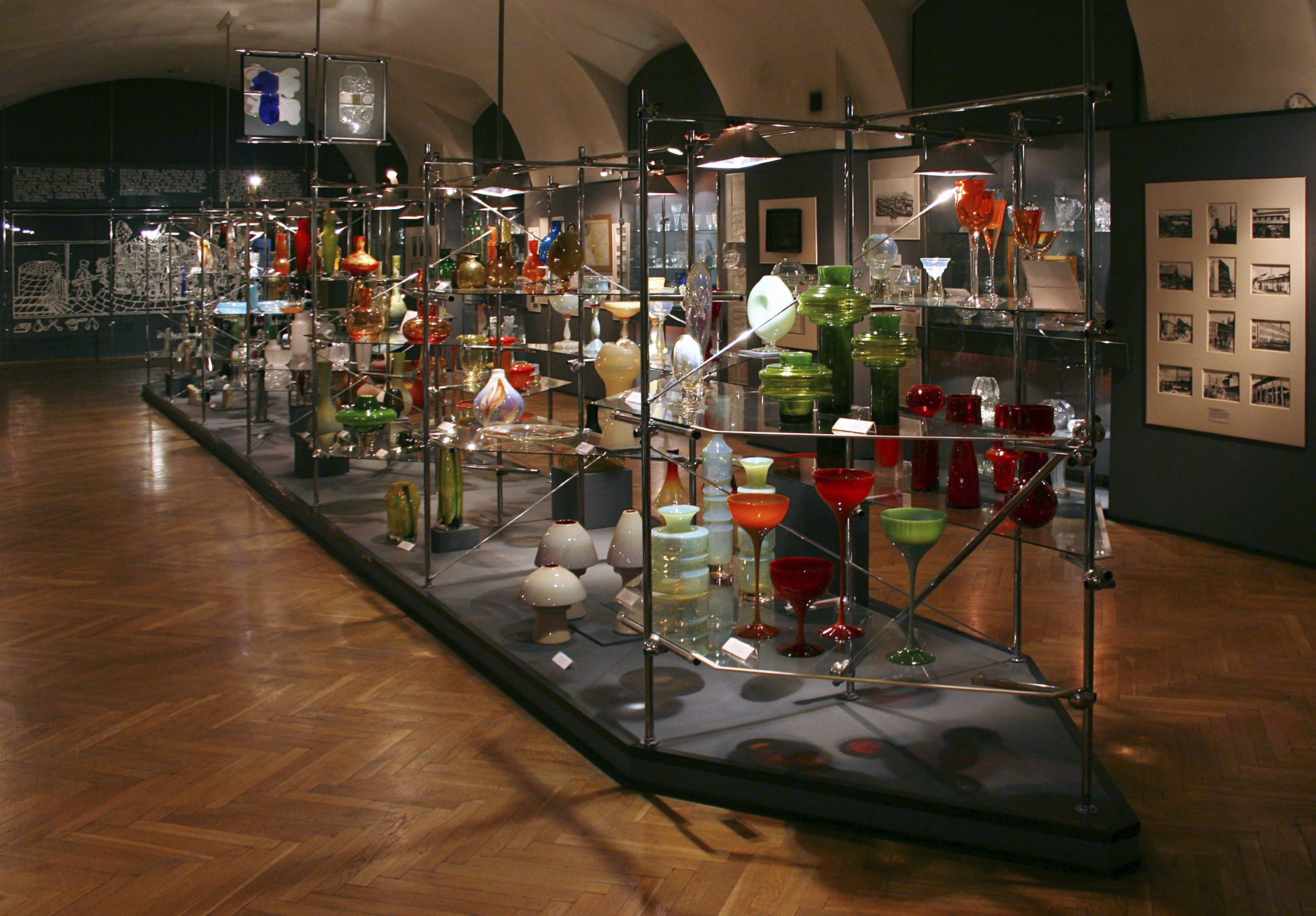 Muzeum Ziemi Kłodzkiej w Kłodzku. Eskpozycja szkła artystycznego.